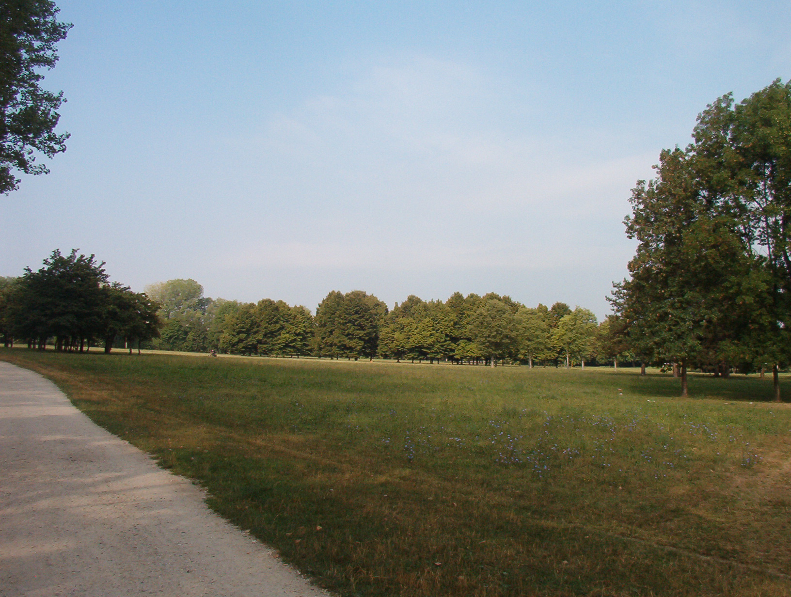 Parco della Pellerina - Torino - Piedmont - Italy